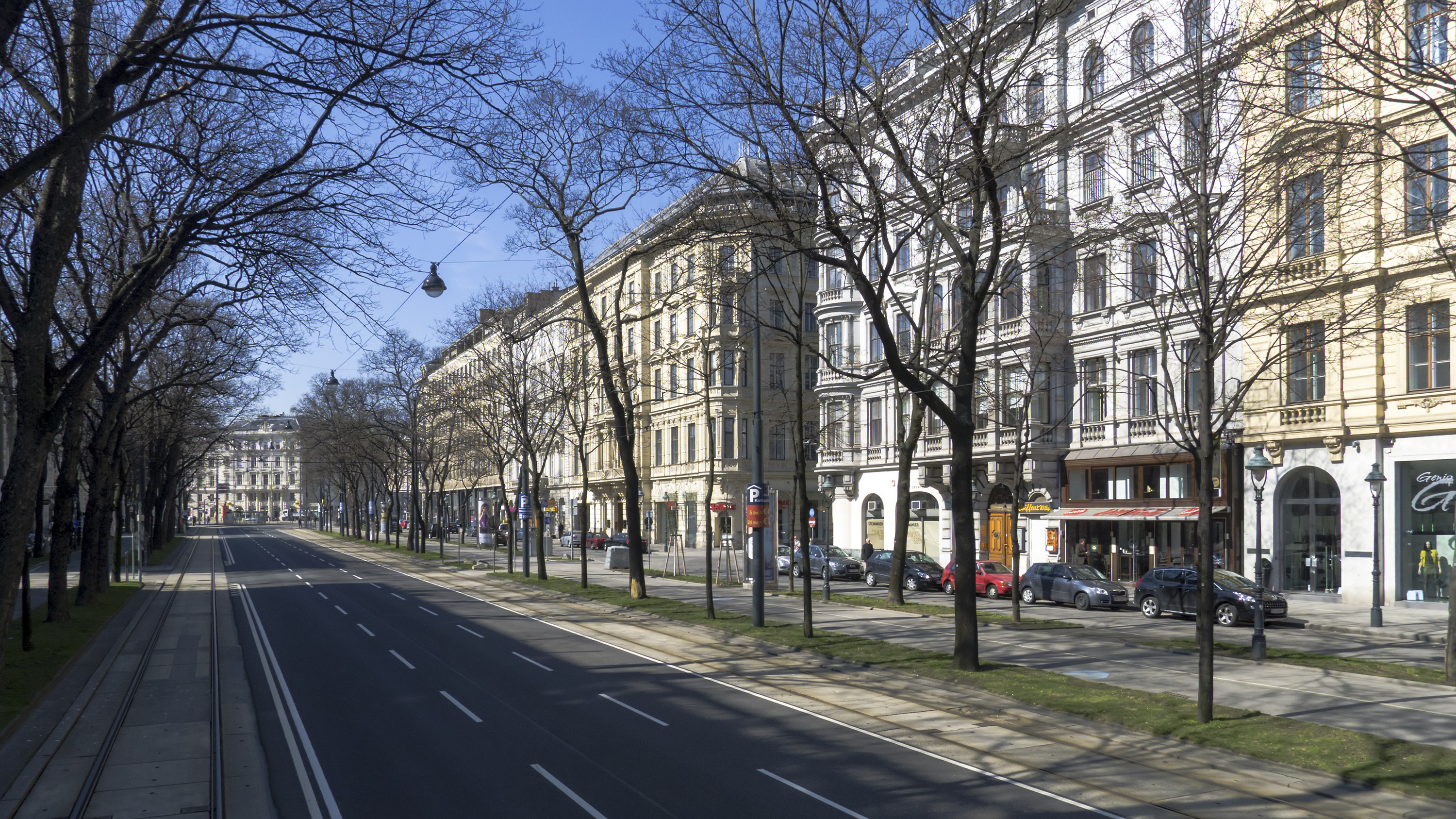 Schubertring bei der Johannesgasse Richtung Südwesten